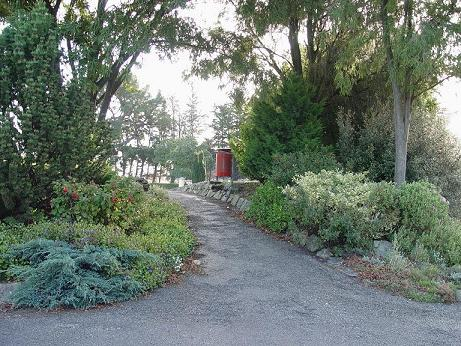 Taken by myself, Jordan Wyatt